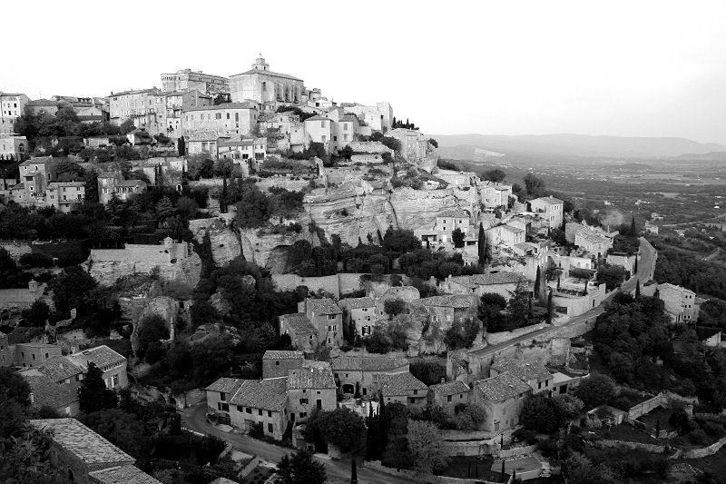 Village de Gordes, en Provence